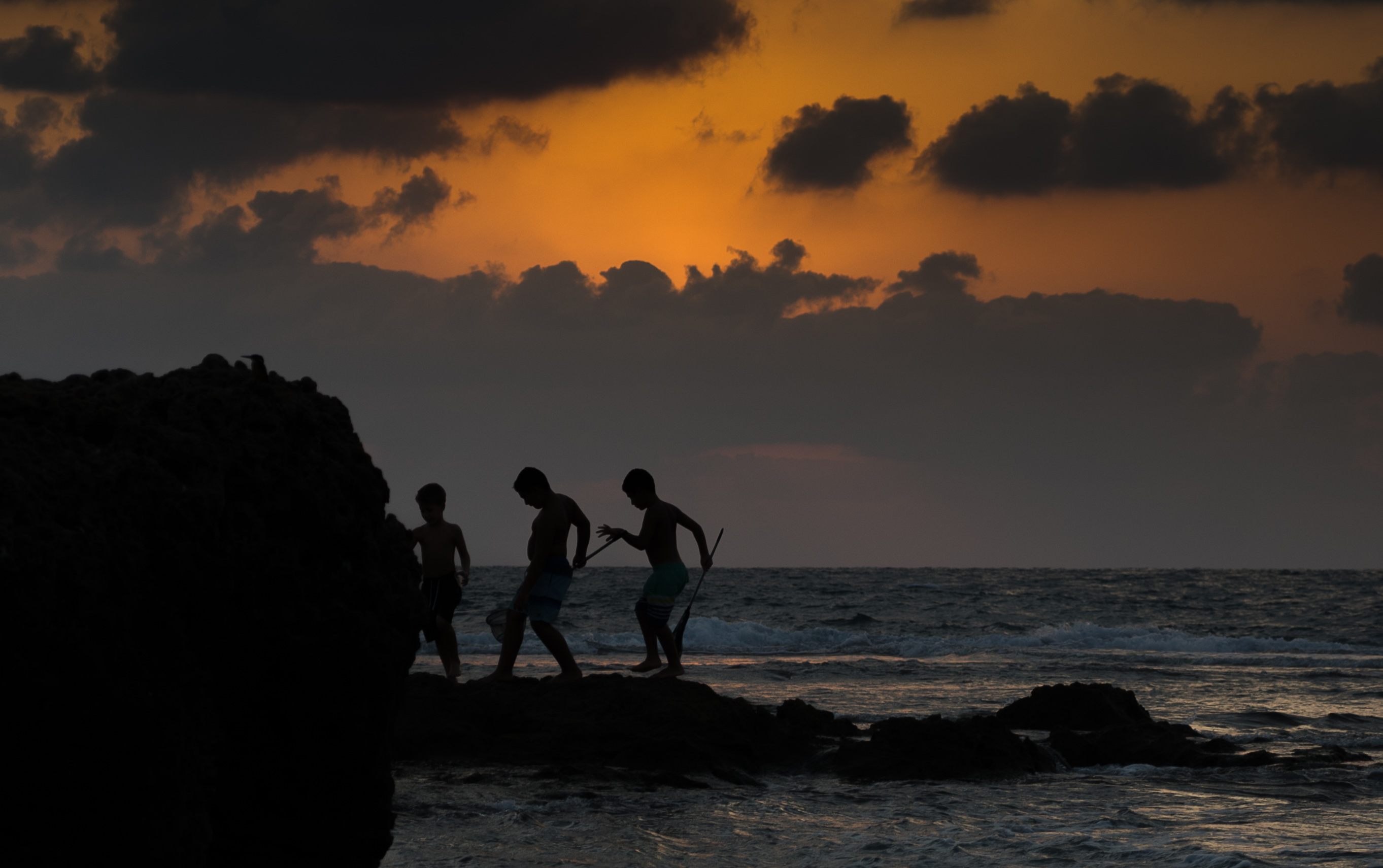 חוף פלמחים הוא חוף ים השוכן במישור החוף הדרומי, מדרום לראשון לציון ולנחל שורק, ליד קיבוץ פלמחים. אזור החוף הוכרז כגן לאומי.